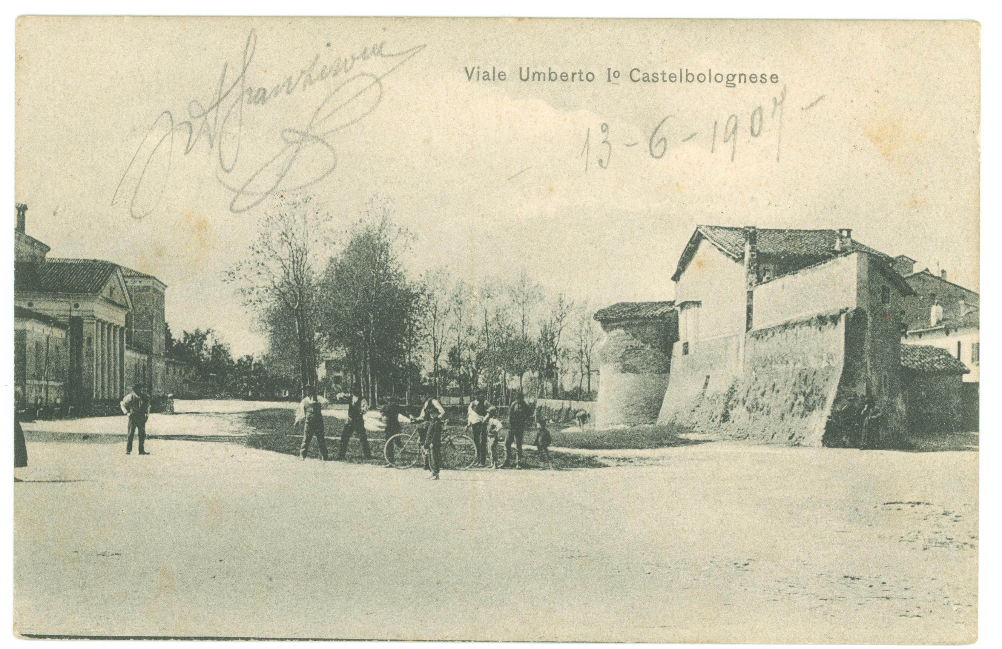 Torrione dell'ospedale This is a photo of a monument which is part of cultural heritage of Italy.